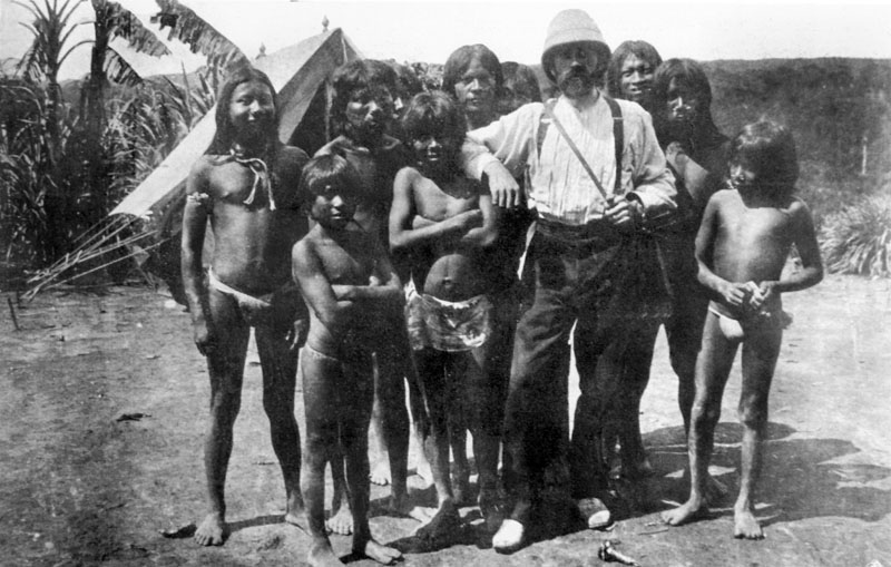 Roger Casement en el Putumayo con un grupo de indígeneas.